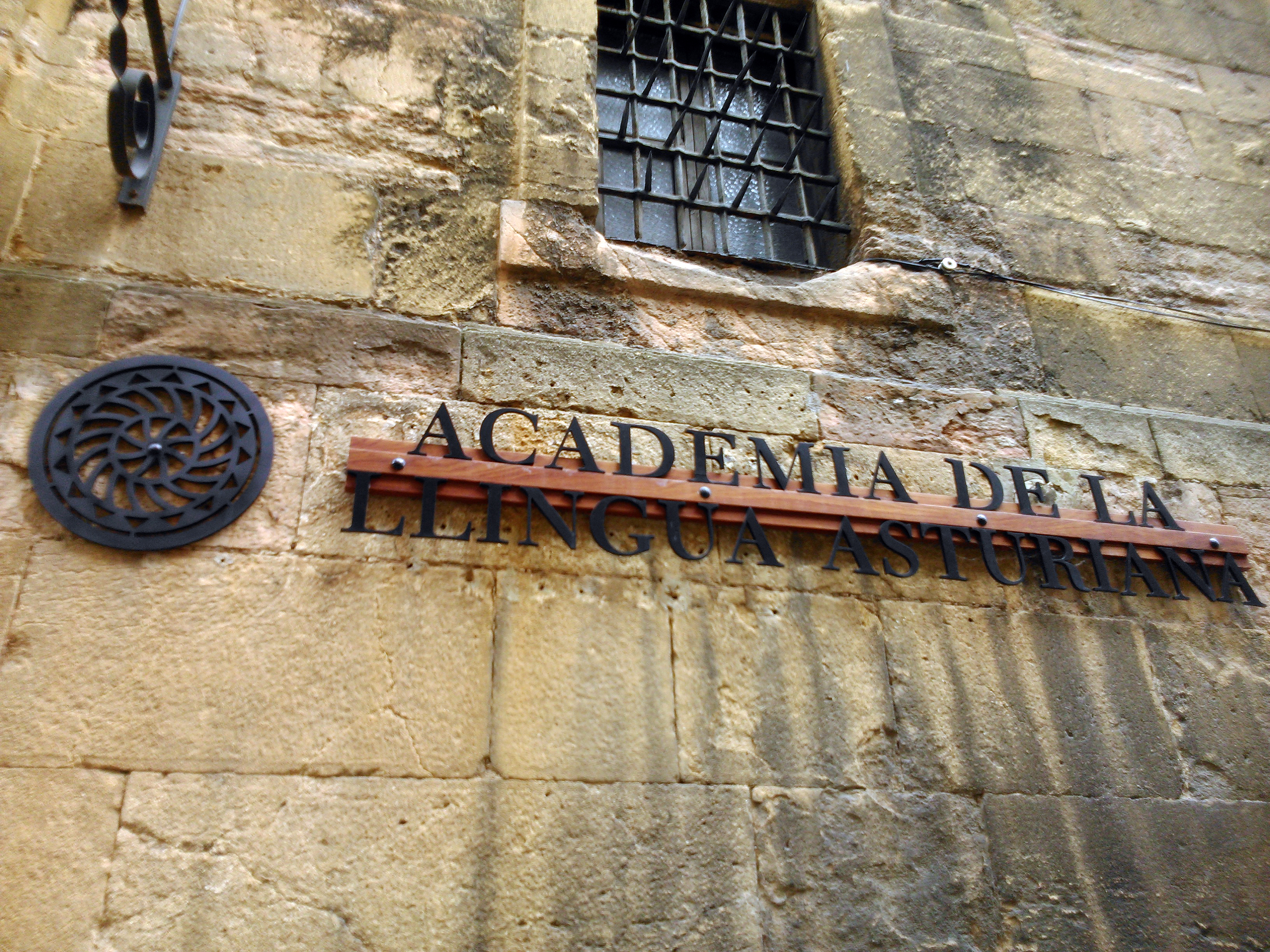 Detalle de la entrada a la sede de la Academia de la Llingua Asturiana, en la ciudad de Oviedo (Asturias, España)